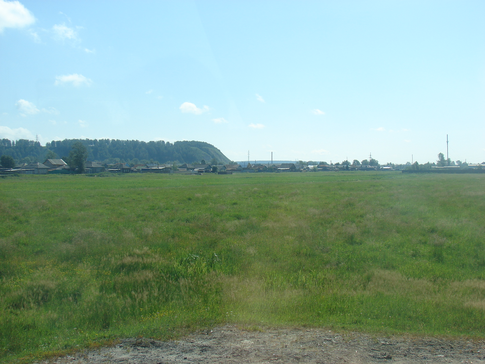 Вид на Подчуваший мыс со стороны Княжьего луга в Тобольске